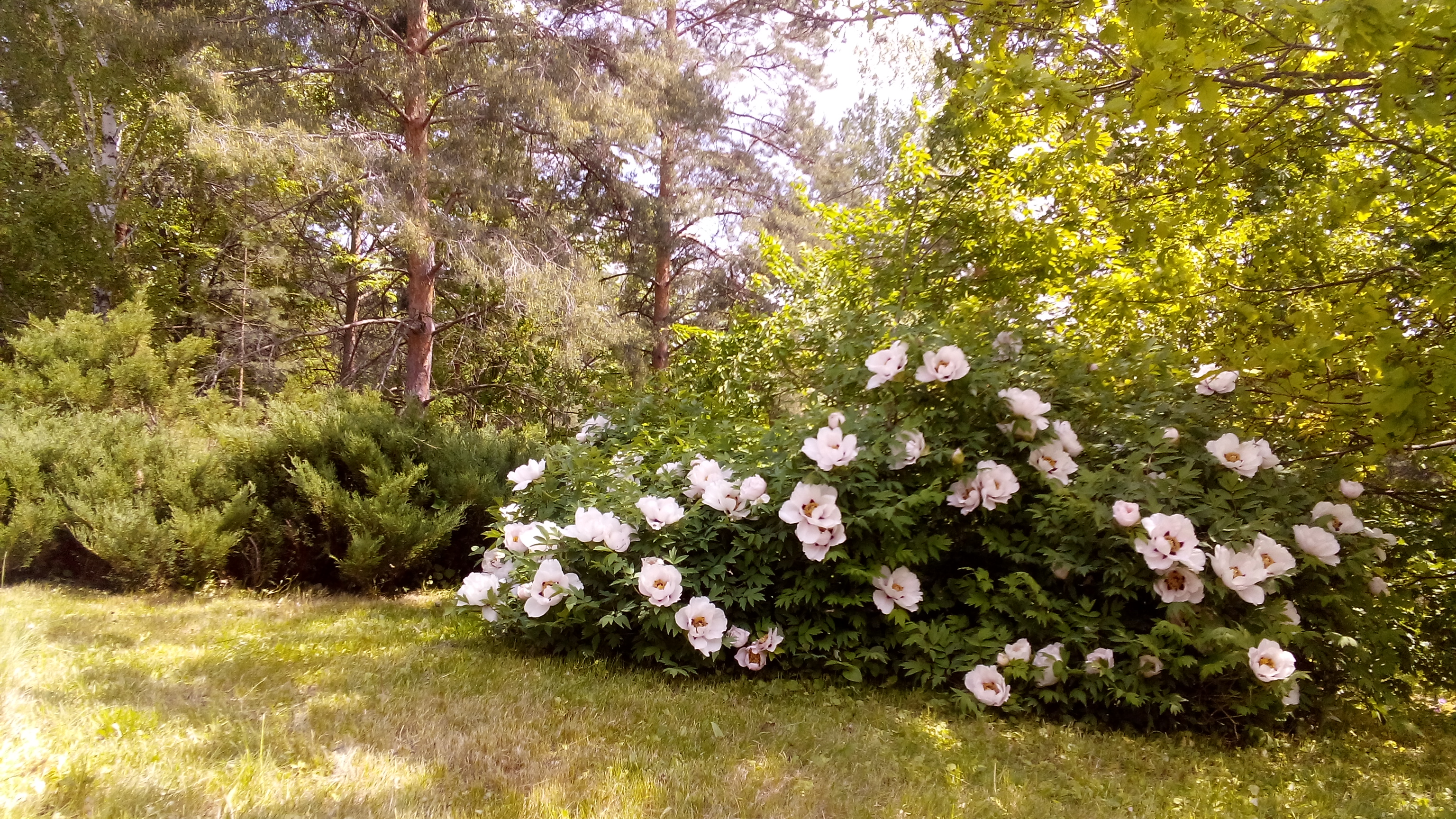 Codru, monument al naturii amplasat în raionul Strășeni, satul Lozova (cod MD-ST-rs-001)